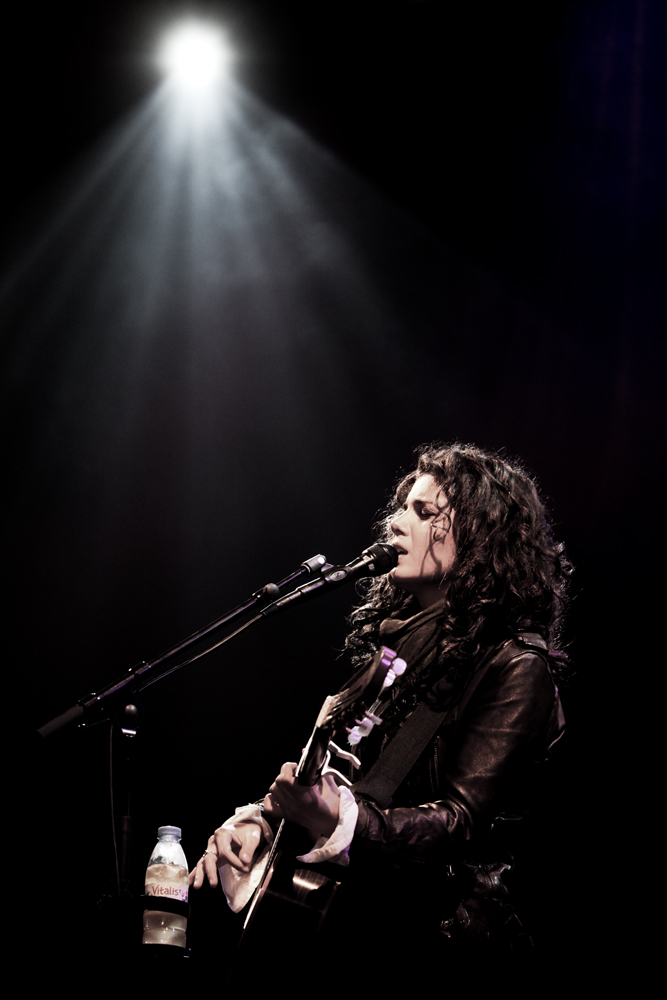 Ao vivo no Cool Jazz Fest, 22 Julho 2009, em Cascais.